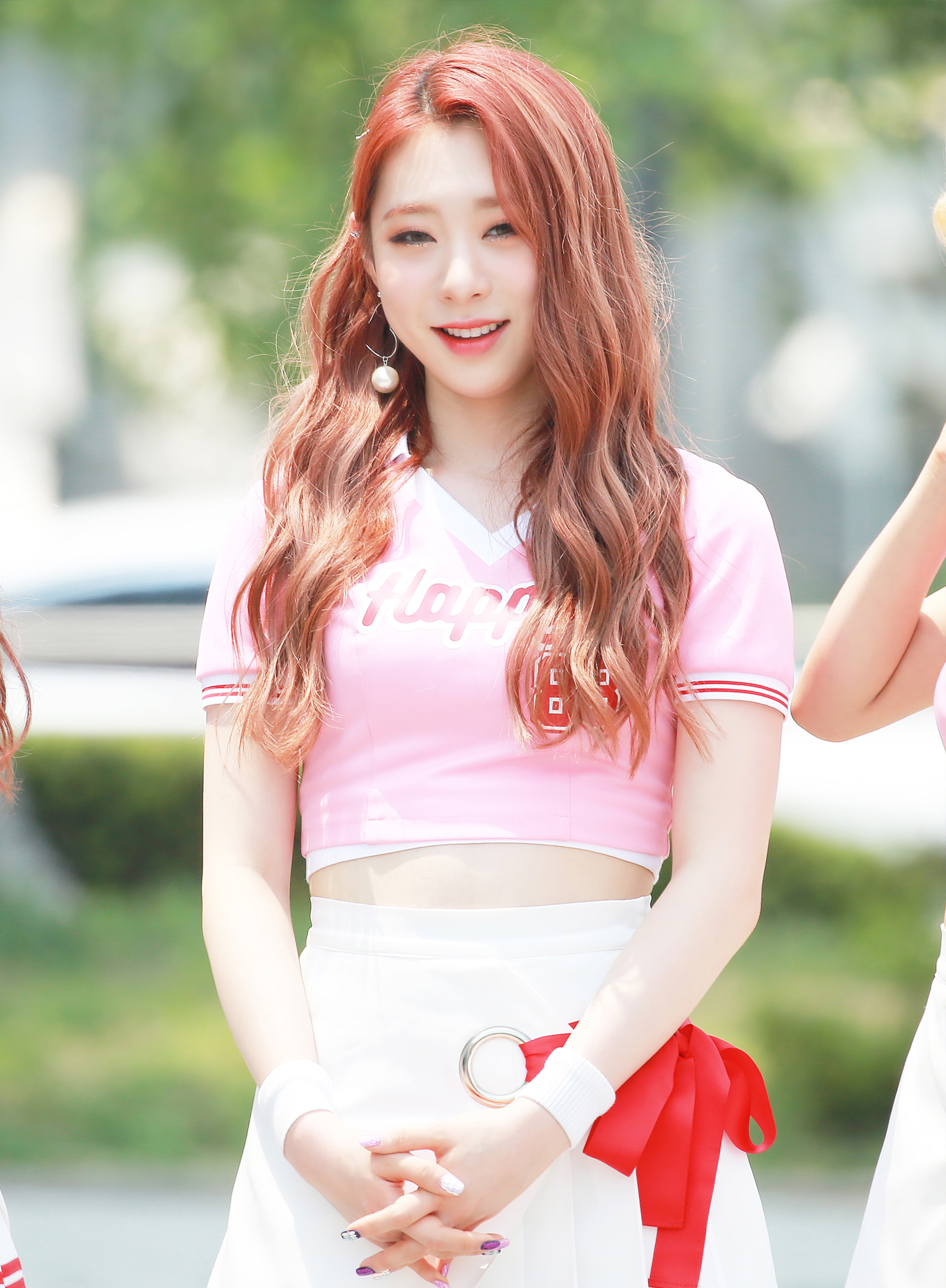 170617 유연정 미니팬미팅